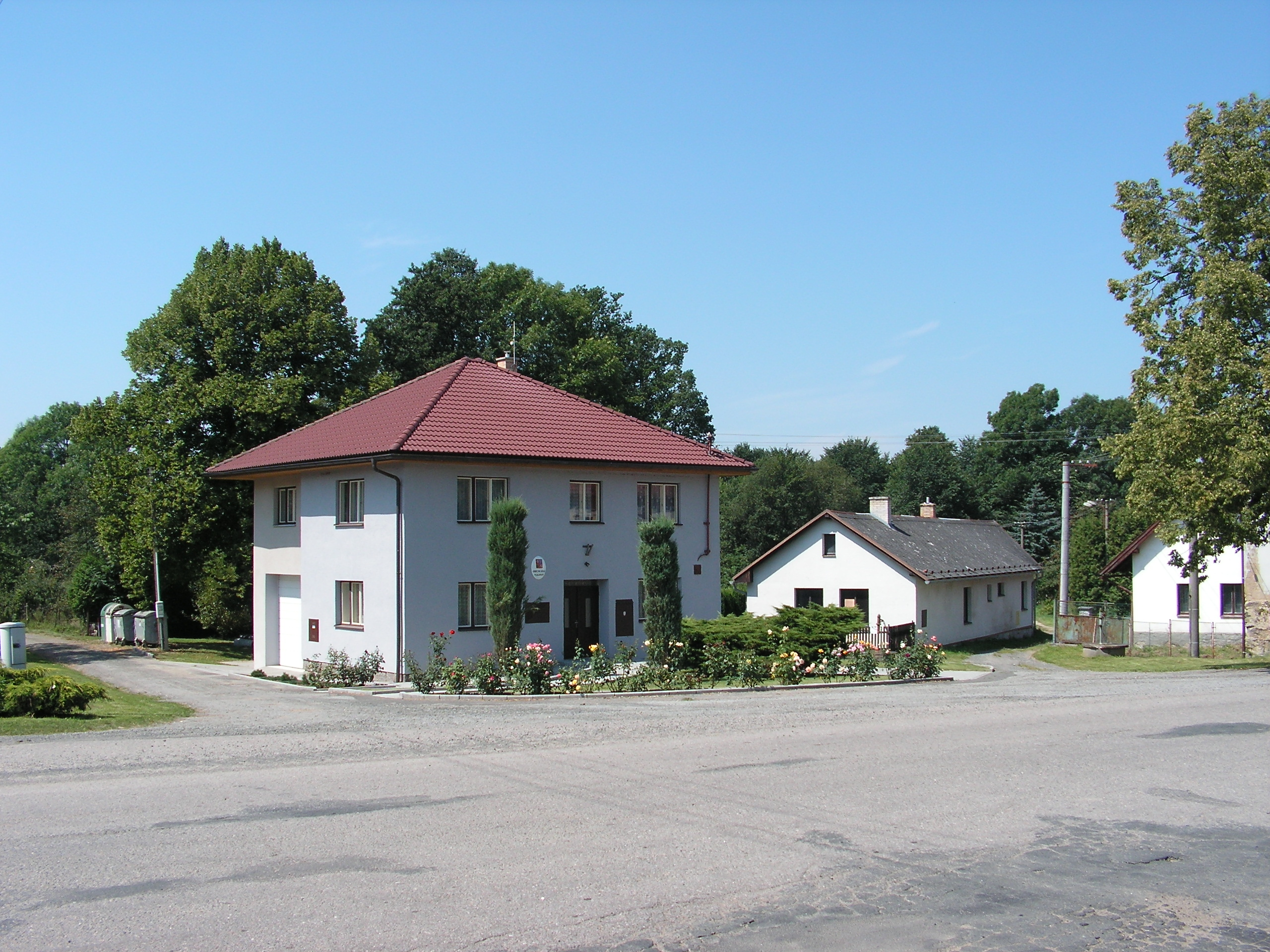 Budova obecního úřadu ve Vlkanově v okrese Havlíčkův Brod.